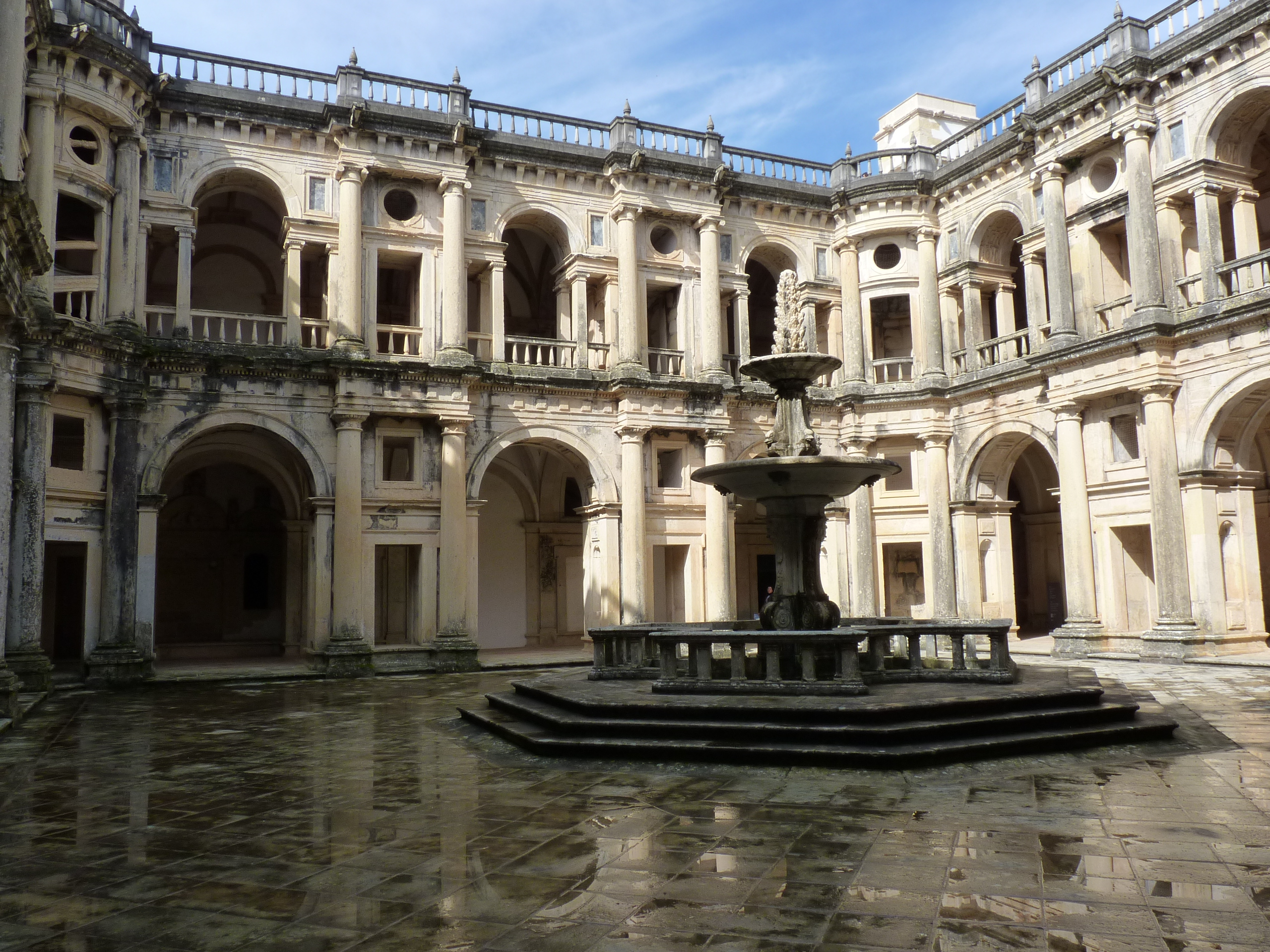 Convento de Cristo em Tomar